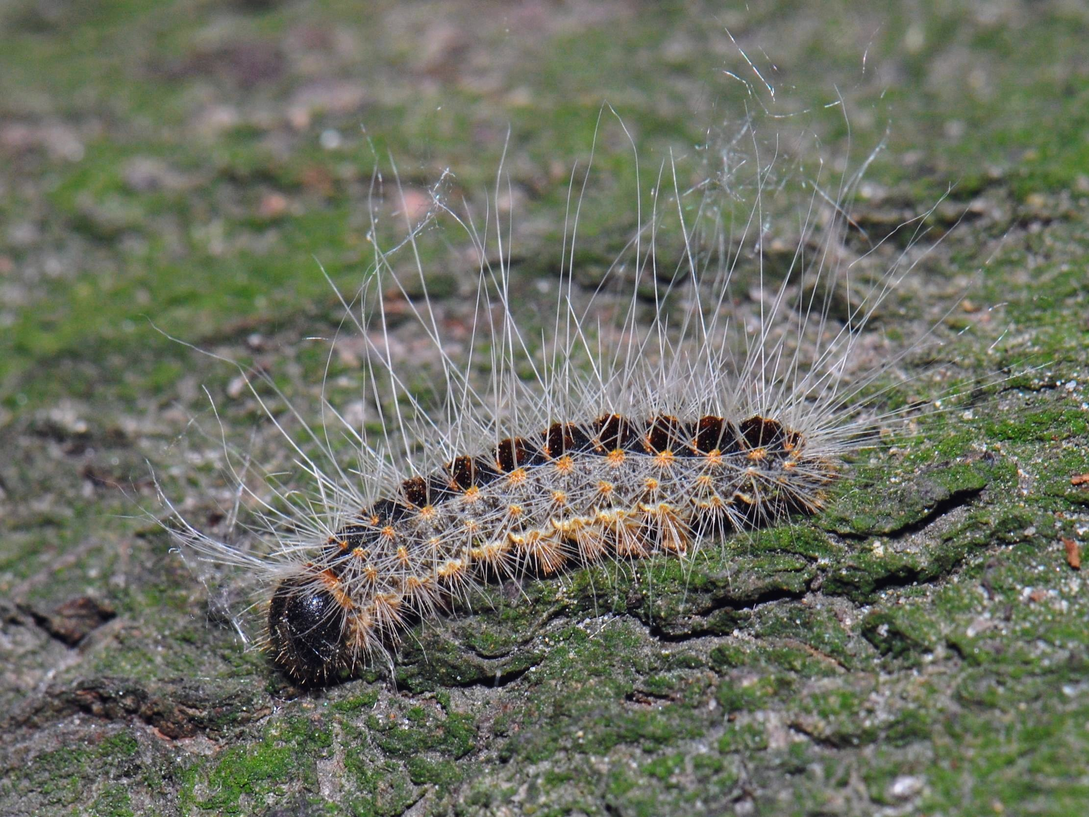 Thaumetopoea processionea, Raupe. Berlin-Charlottenburg